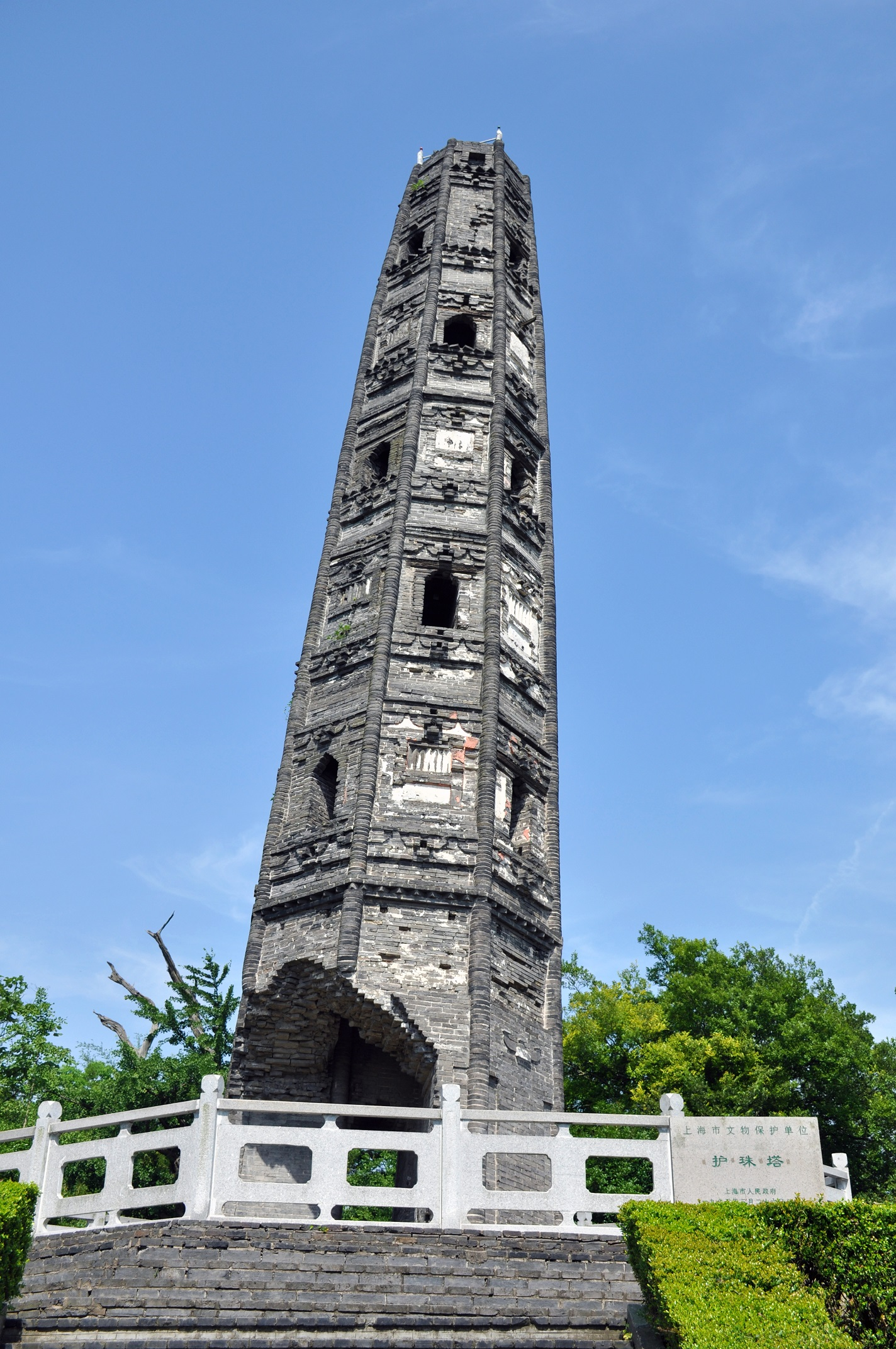 中文（中国大陆）: 护珠塔 松江天马山 南宋元丰二年(1079年)